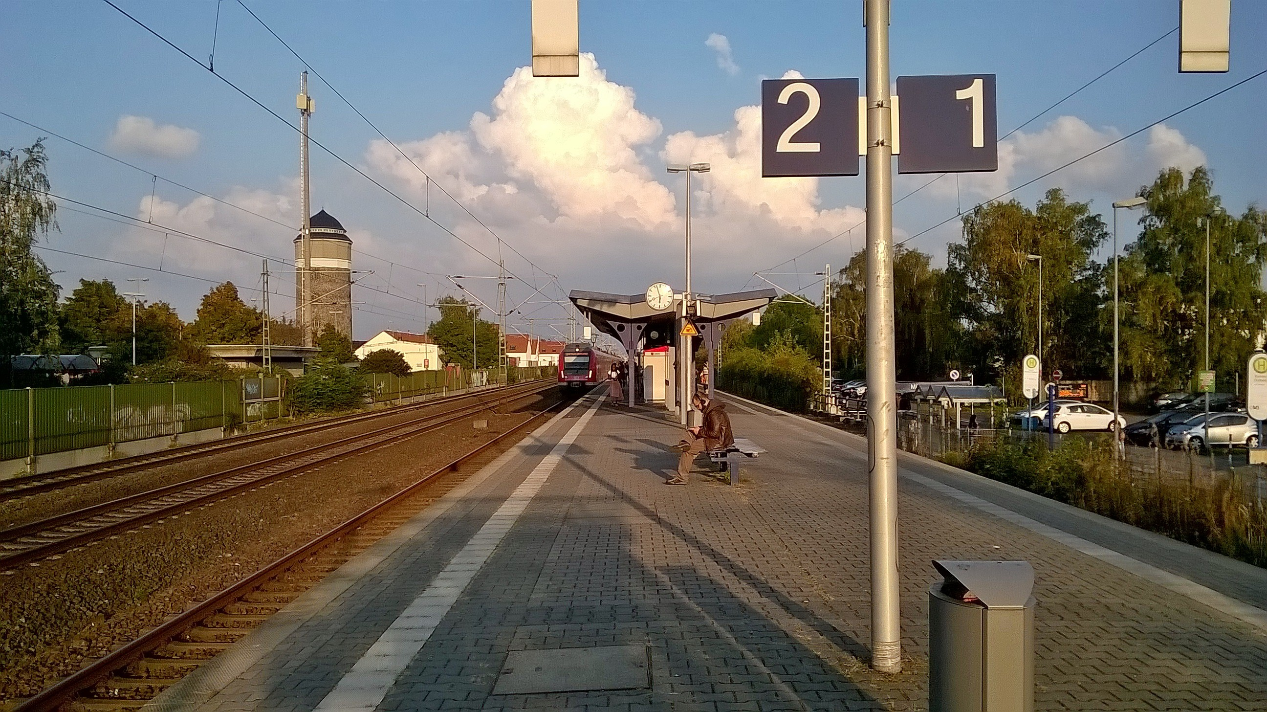 Bahnsteig des Bahnhofs Mühlheim (Main) mit Blick Richtung Hanau. Zug der Linie S8 einfahrend auf Gleis 2.